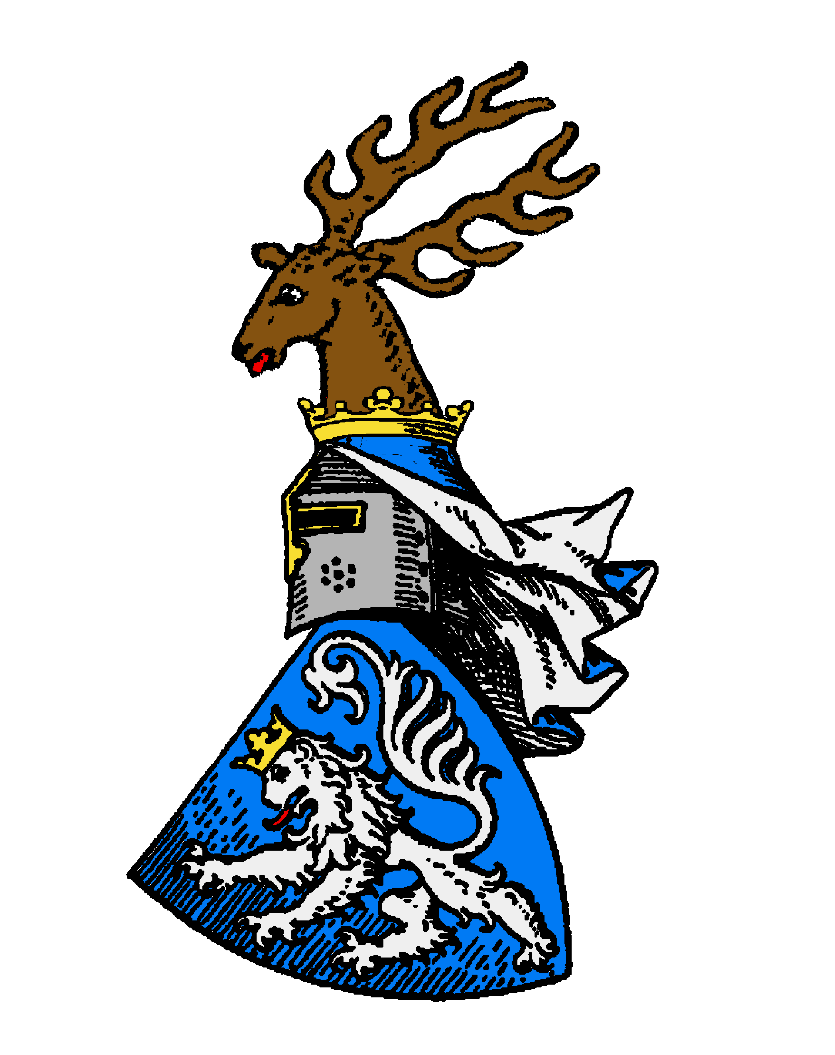 Stammwappen der Edelherren von Itter